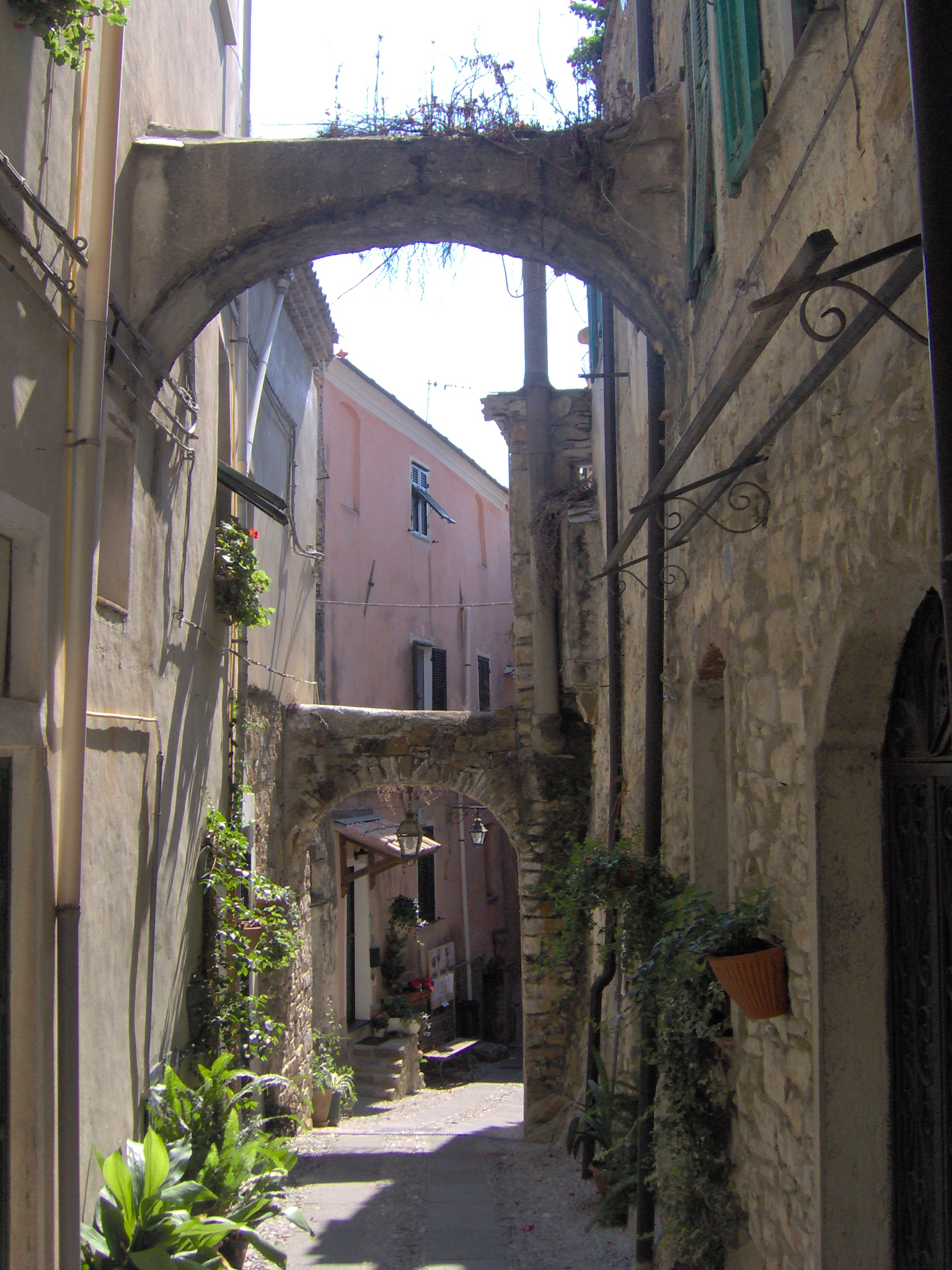 Terzorio (IM), Caruggio tipico.